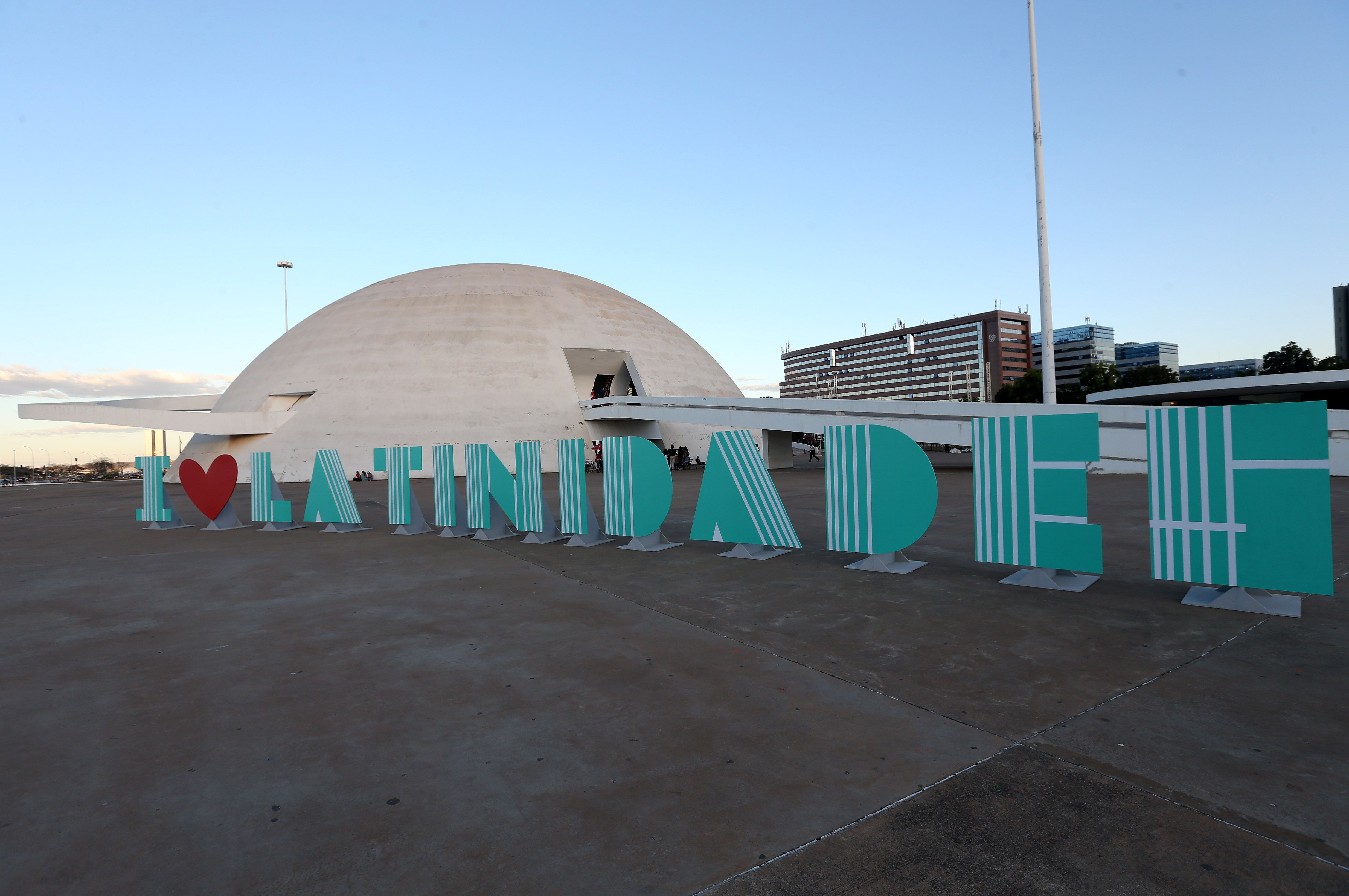 Brasília - Museu Nacional sedia a 9ª edição do Festival Latinidades, que enfoca a comunicação na luta pelos direitos das mulheres negras e contra o racismo (Wilson Dias/Agência Brasil)